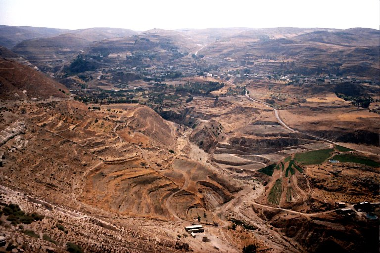 jordan, taken by יואב רוזנברג